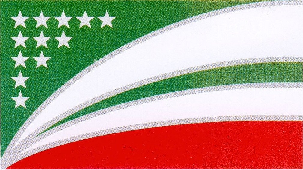 En la franja superior, se encuentran ubicadas las 12 estrellas plateadas que representan cada uno de los barrios que componen la ciudad (plateadas porque representan la templanza, verdad e integridad de todos y cada unos de los habitantes de cada barrio). Estas plasmadas sobre un fondo color verde, que representa, no sólo la riqueza productiva que posee, sino la esperanza de su gente y se encuentran agrupadas como símbolo de que:... “la unión hace la fuerza”.- La franja inferior de color rojo representa la fortaleza de los sancristobalenses para afrontar los escollos en su camino al progreso. Como centro partiendo desde el ángulo inferior izquierdo surgen las vías del ferrocarril de manera estilizada, representando nuestras raíces como pueblo netamente ferroviario y evolucionando en un camino que nos proyecta a un futuro de progreso y engrandecimiento. Los bordes de plata y el verde representan que ese camino a recorrer será cimentado en la templanza, verdad e integridad de los sancristobalenses, alentados con el verde esperanza.